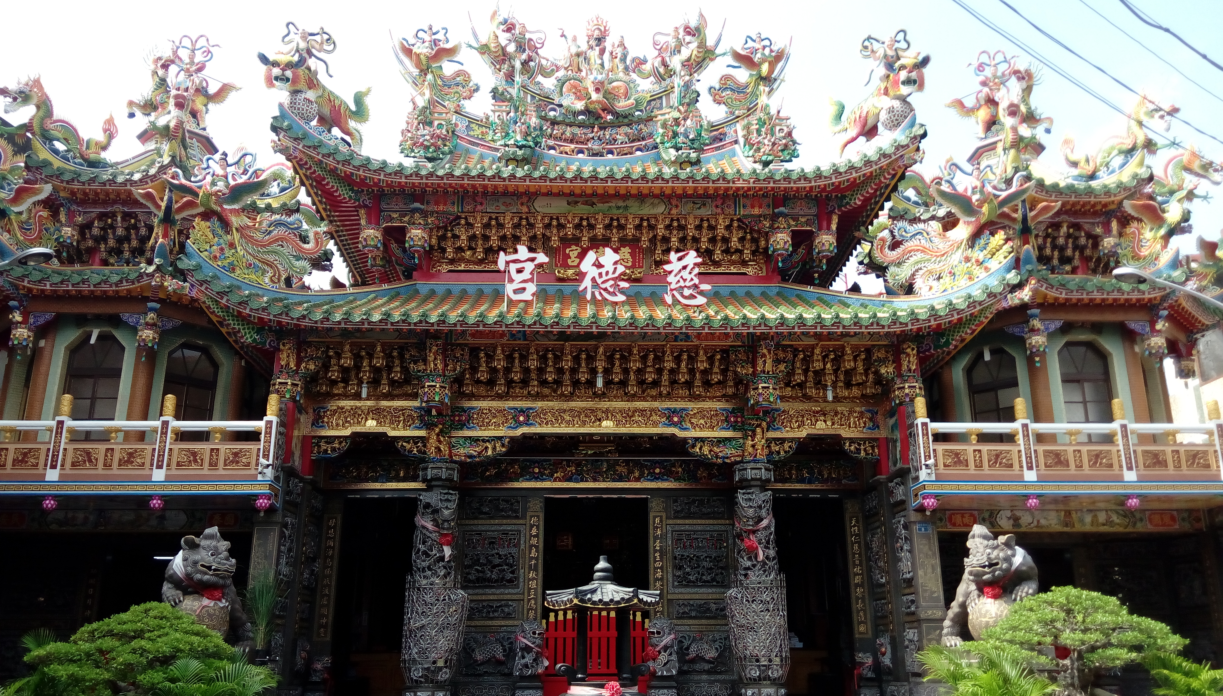 左營店仔頂慈德宮